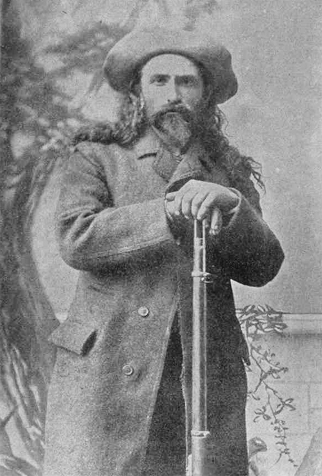 « Le fameux Pierre Le Royer », photographie prise en 1889 tirée de L'album universel, vol. 19 no 31. p. 721 publié en 1902 dans lequel l'image est recadrée.